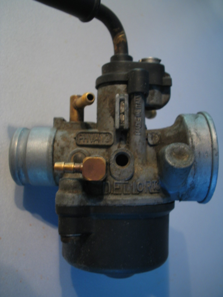 DellOrto Carburator (Puch/Piaggio Zip/Sfrea) 50 cc models